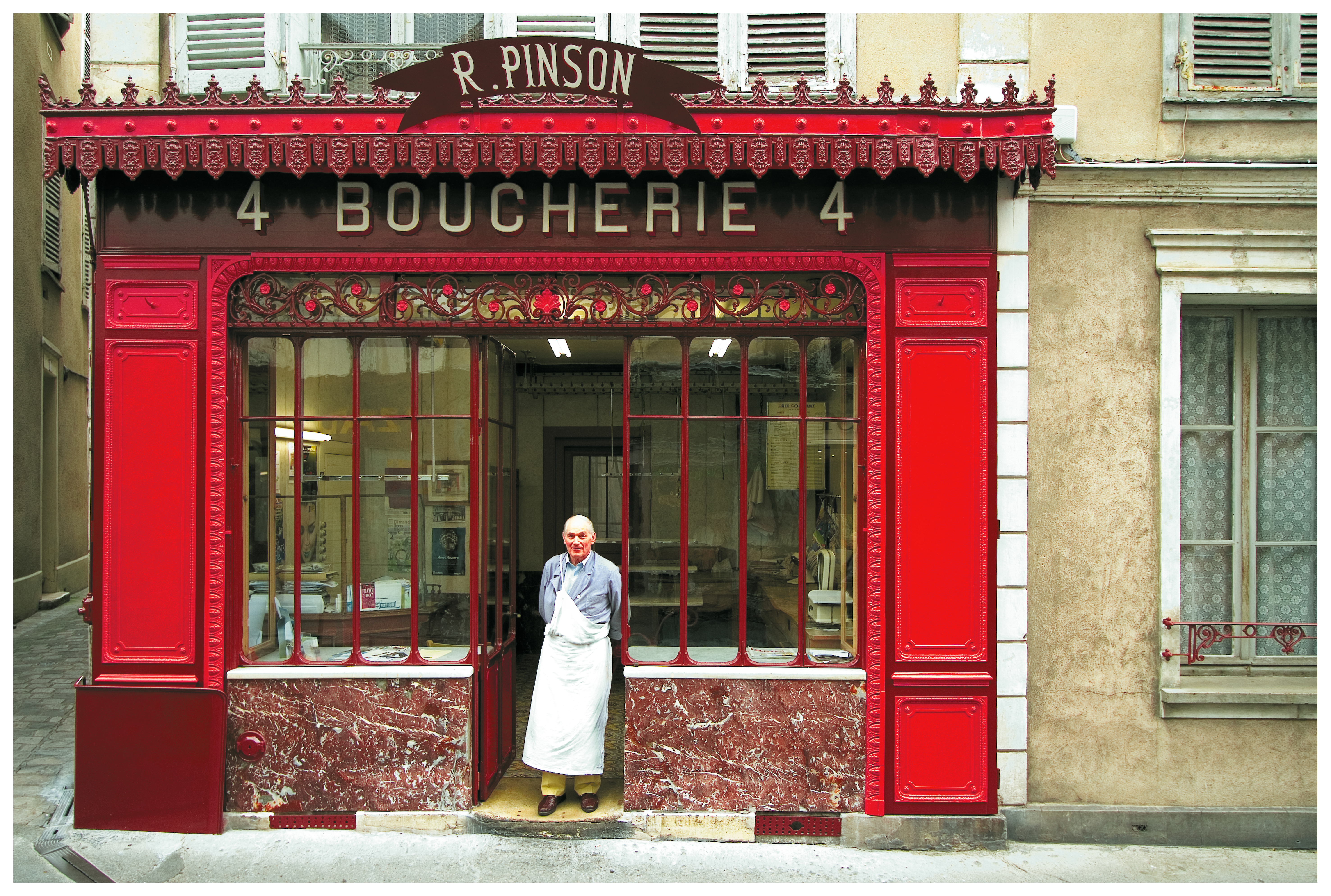 M. Roland PINSON sur le pas de sa boutique. Propriétaire depuis 1957. Fermeture en 2013 Prédécesseur : M. COUTURIER